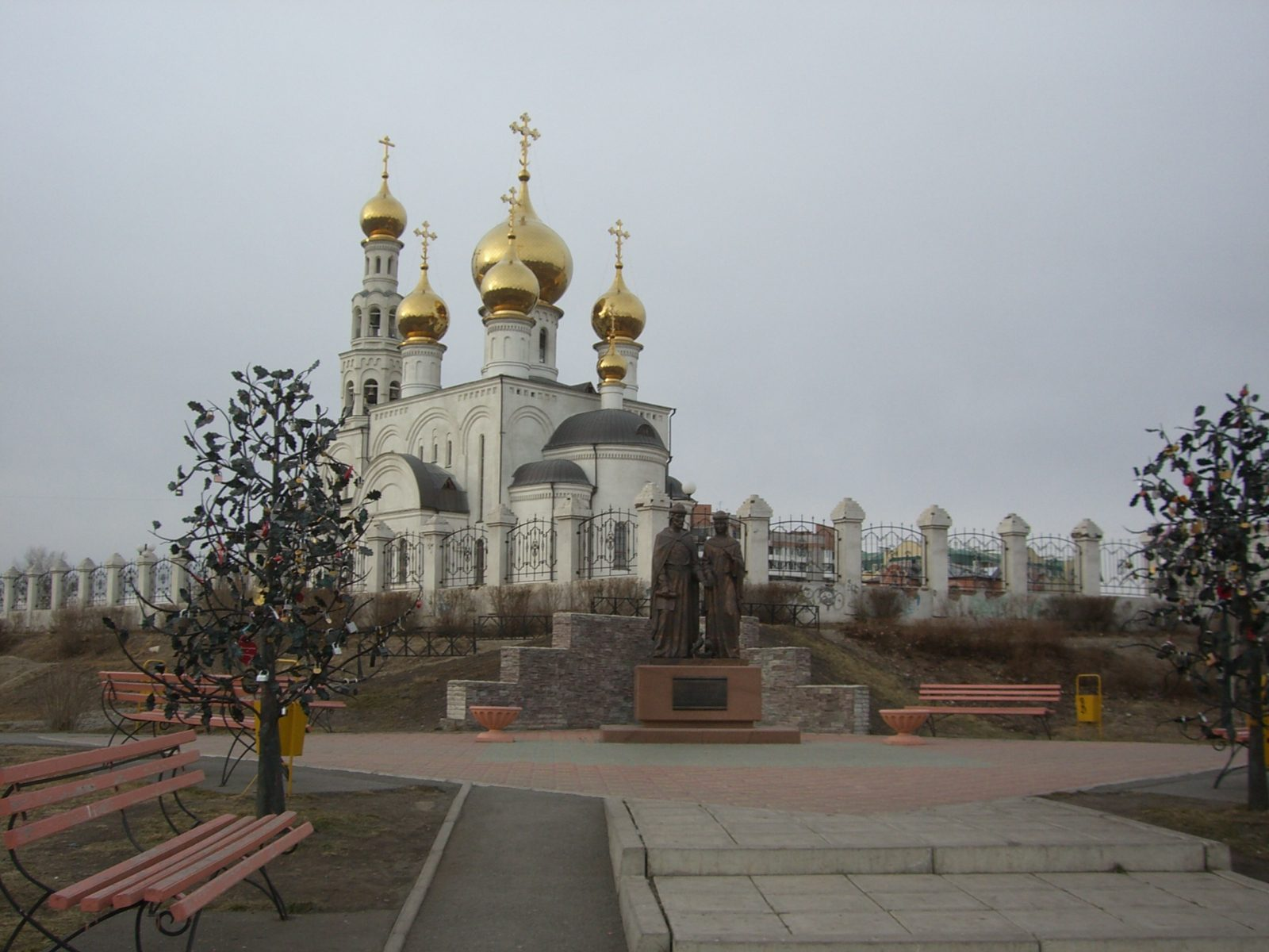 Katedrála Přeměnění Páně v Abakanu